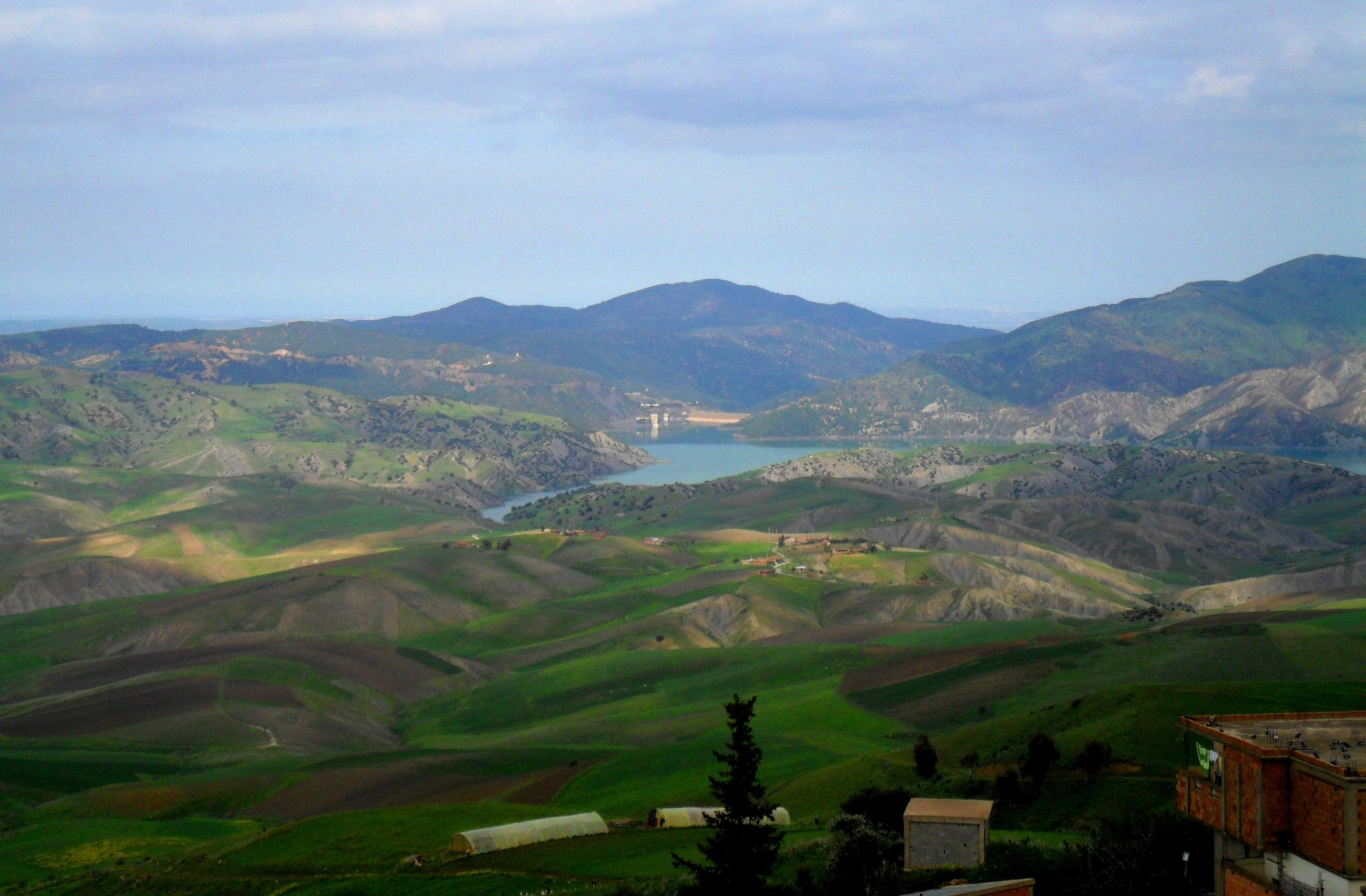 Barrage de Bouroumi - Ain Dem عين الدم